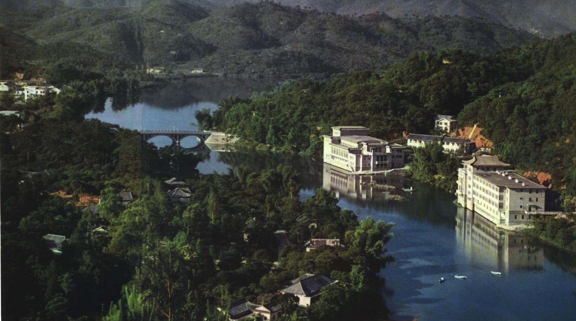 1964-08 1964年 广东从化温泉